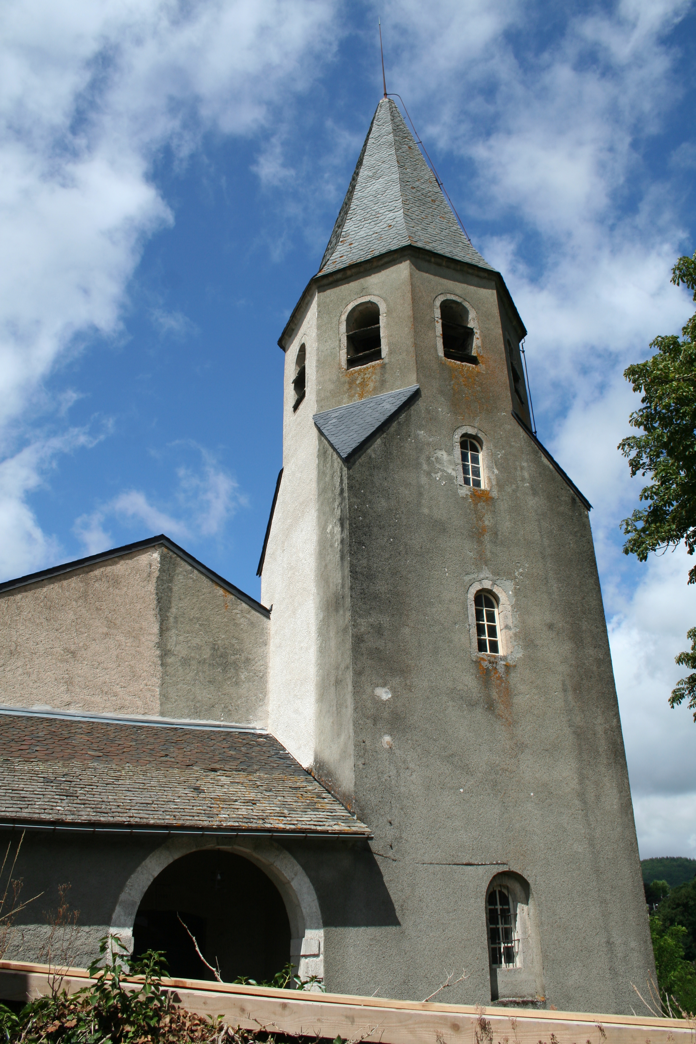 Viane (Tarn) - temple calviniste.